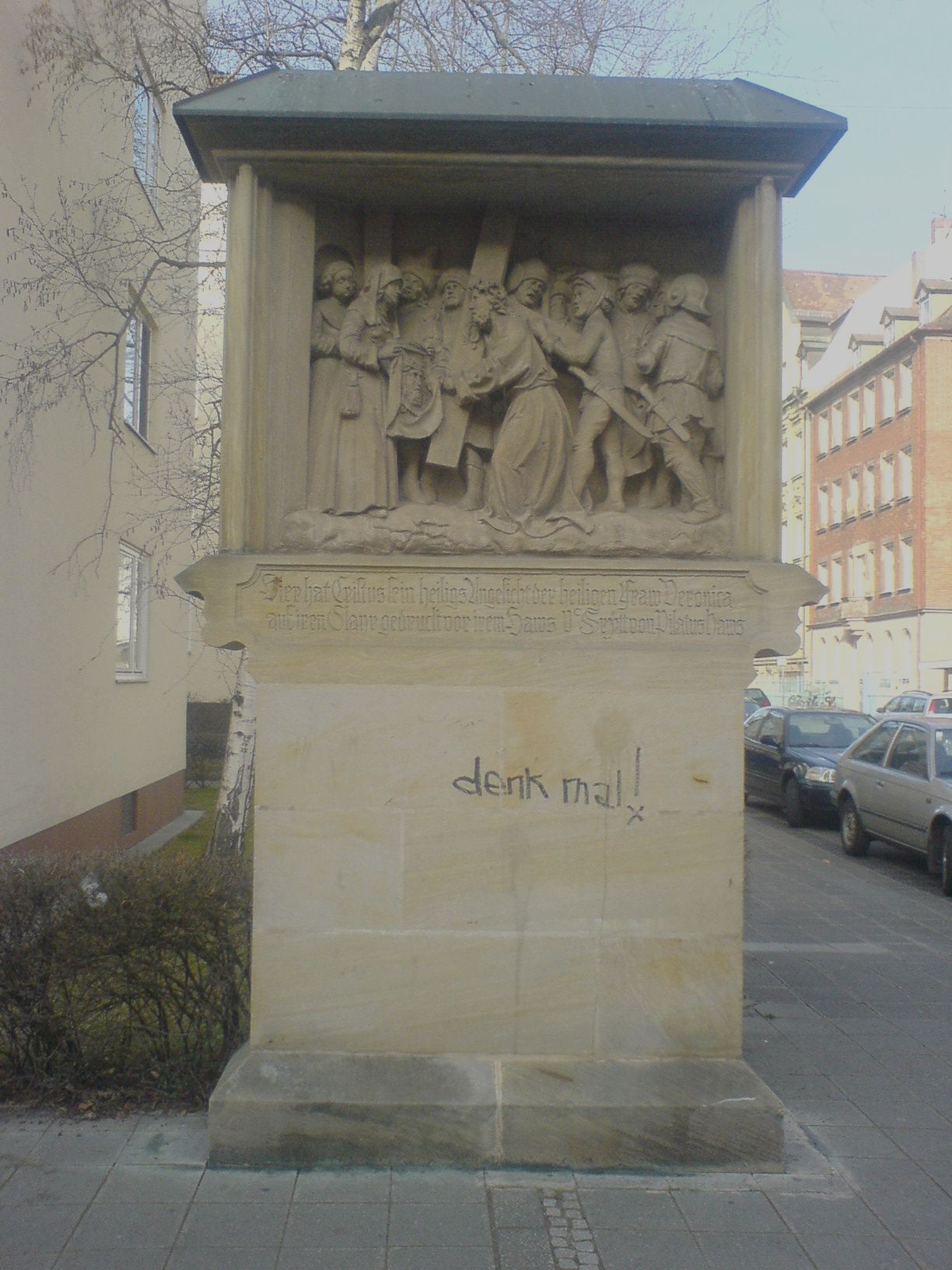 Adam-Kraft-Kreuzweg, Nuremberg, Germany